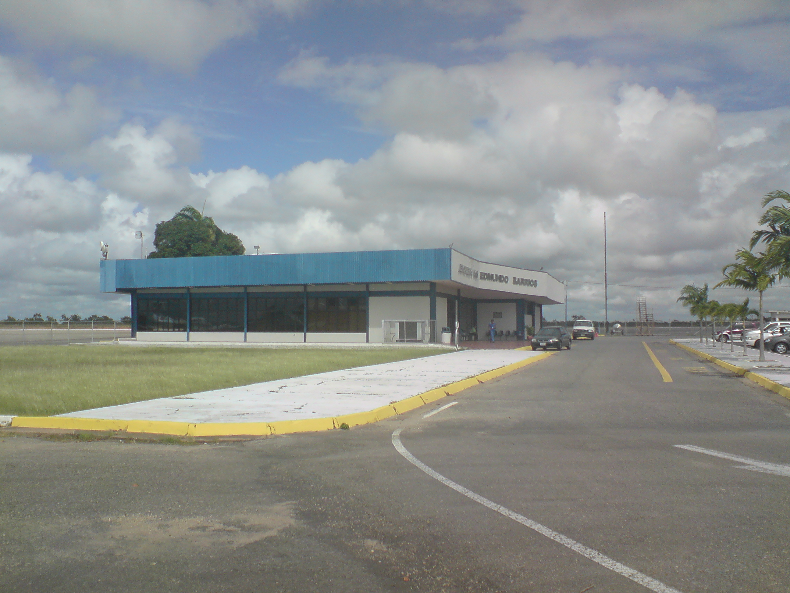 foto de la fachada del aeropuerto nacional de San Tome Don Edmundo Barrios.